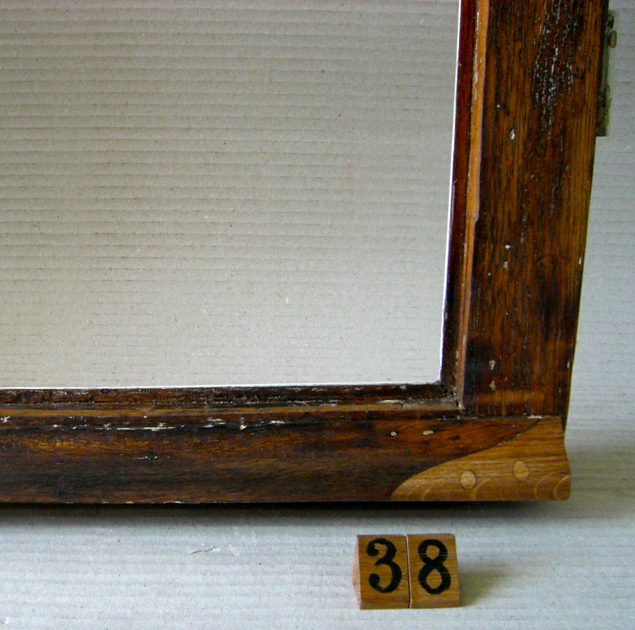 Fensterrestaurierung: Holzreparatur an einem Wetterschenkel.